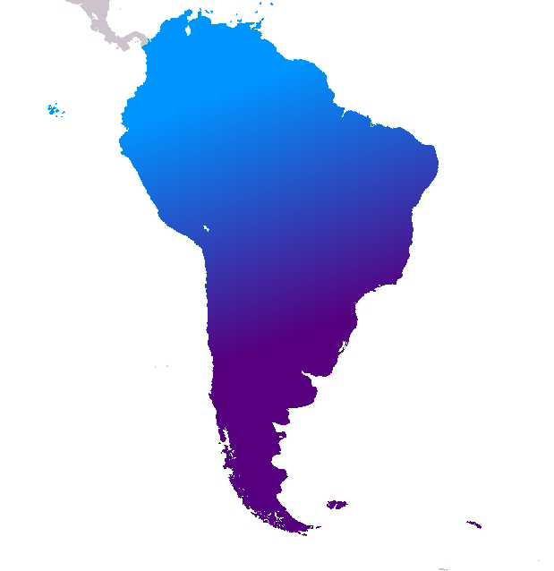 Localização geografica da Borboleta Coruja